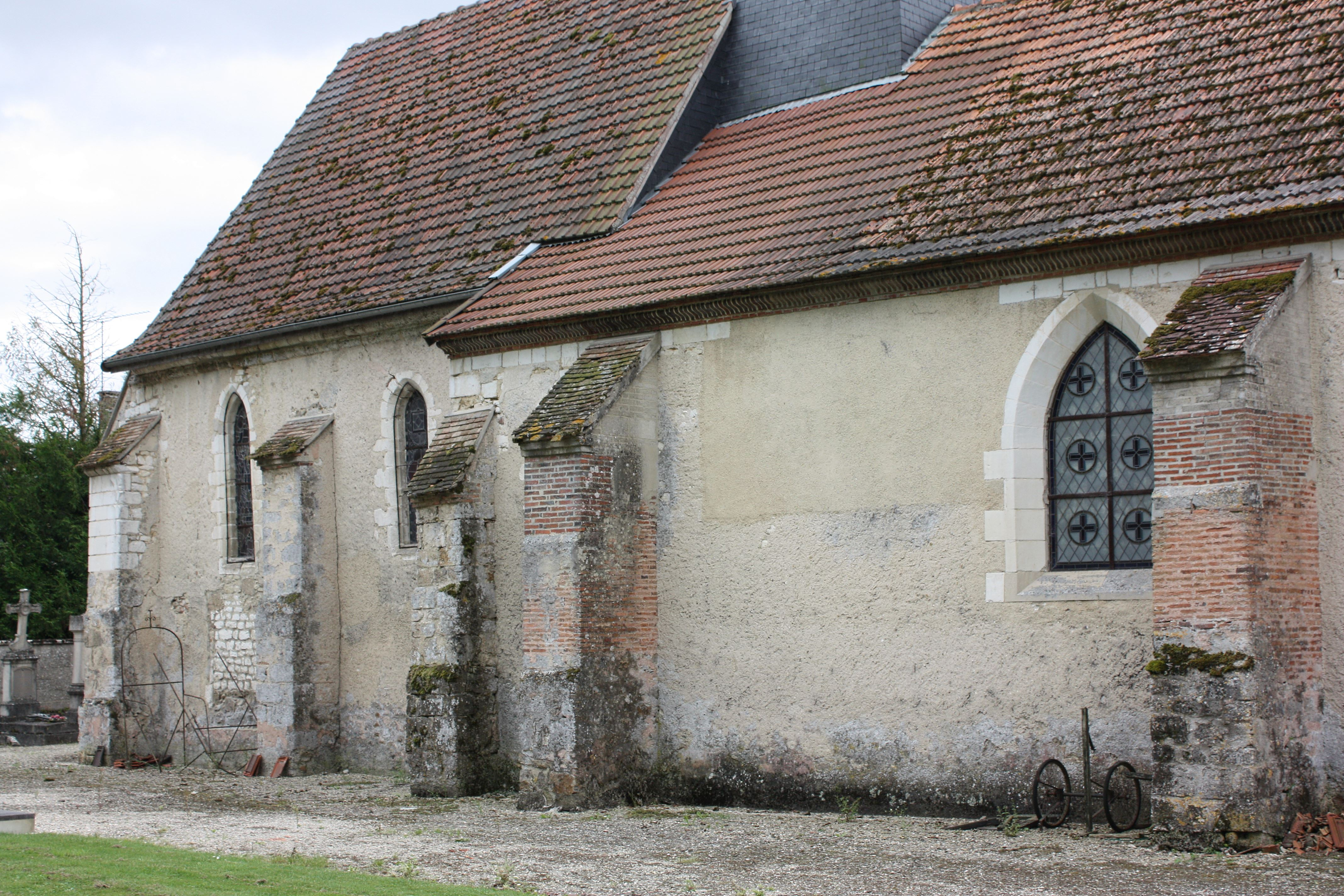 Etrelles-sur-Aube - Eglise de l'Assomption